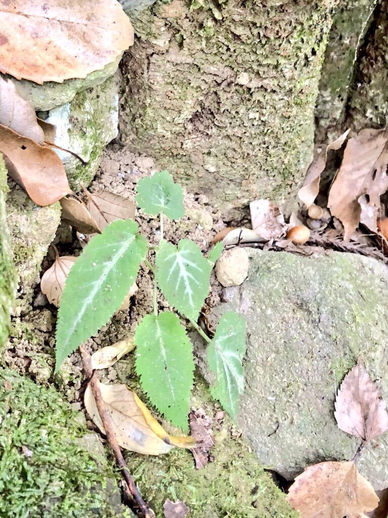 ビロードイチゴの幼株。真ん中の葉脈にそって白い模様がある。